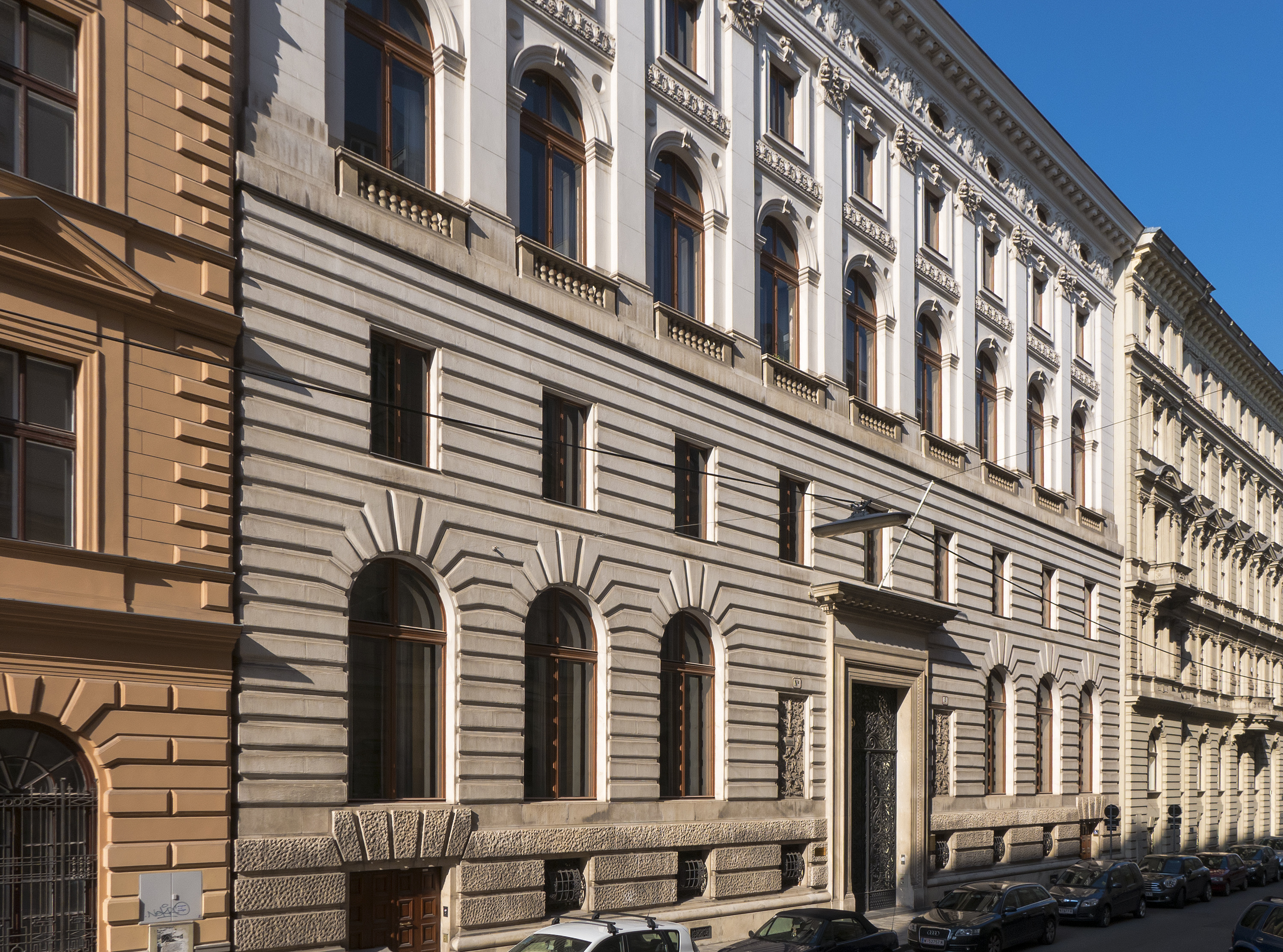 Länderbankzentrale (Hohenstaufengasse) in Wien 1